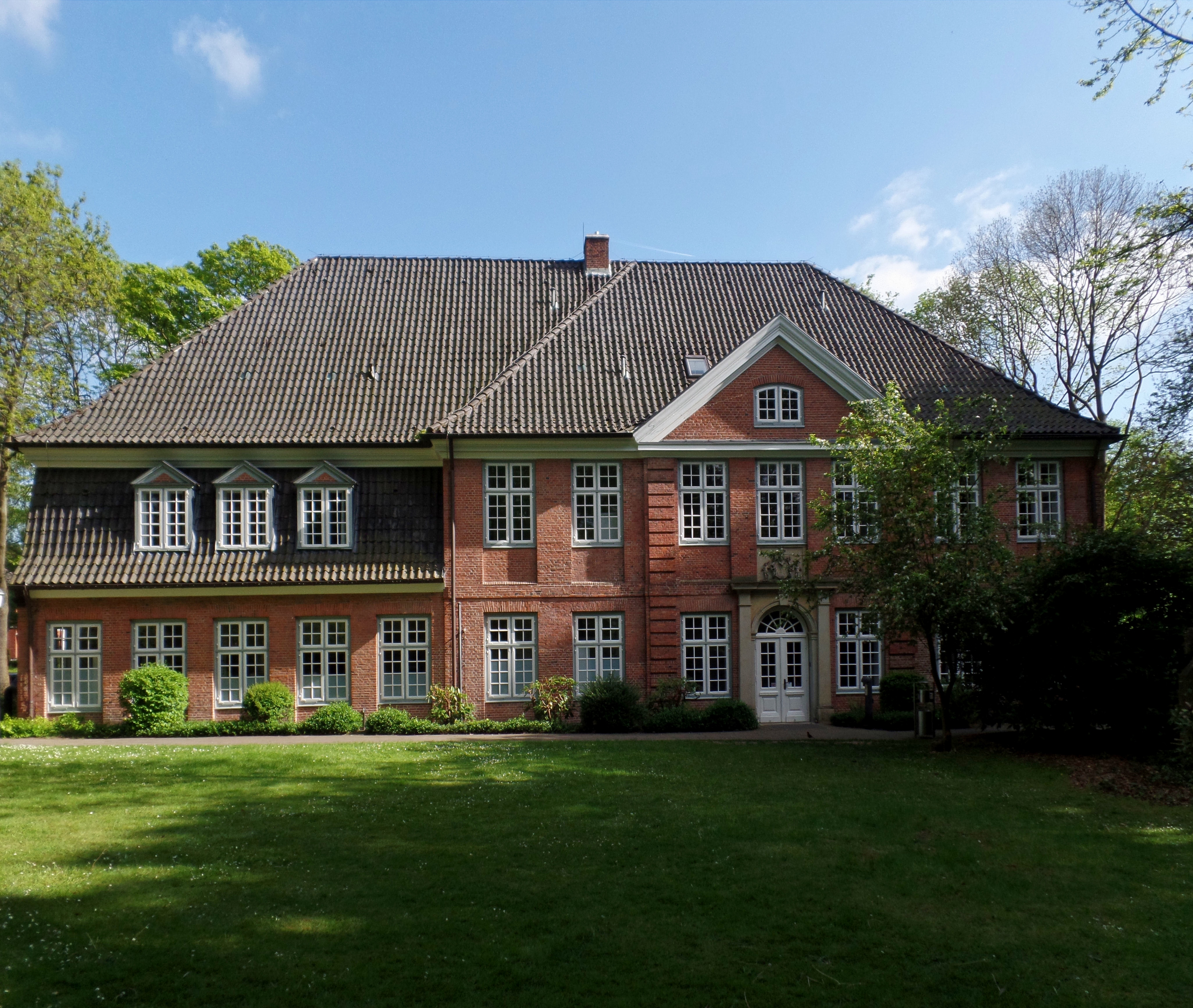 Stavenhagenhaus